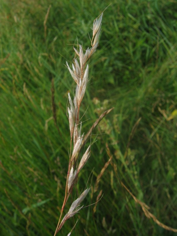 Flaumiger Wiesenhafer (Helictotrichon pubescens), Gragetopshof